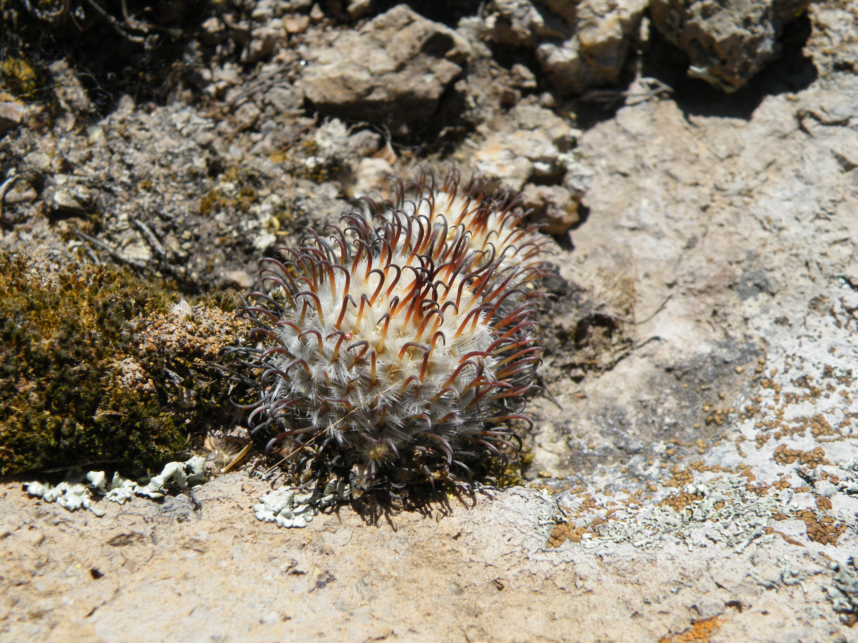 Near el Ocote, Aguascalientes